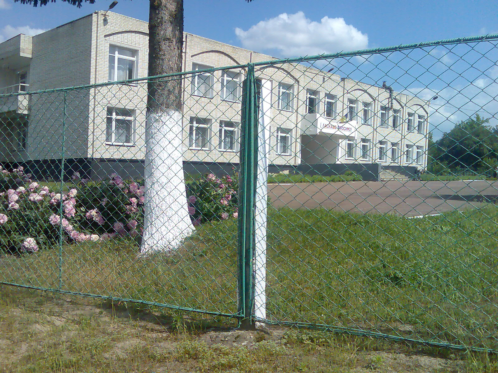 Орлівський навчально-виховний комплекс: загальноосвітня школа І-ІІІ ступенів - дошкільний навчальний заклад Ямпільської районної ради Сумської області